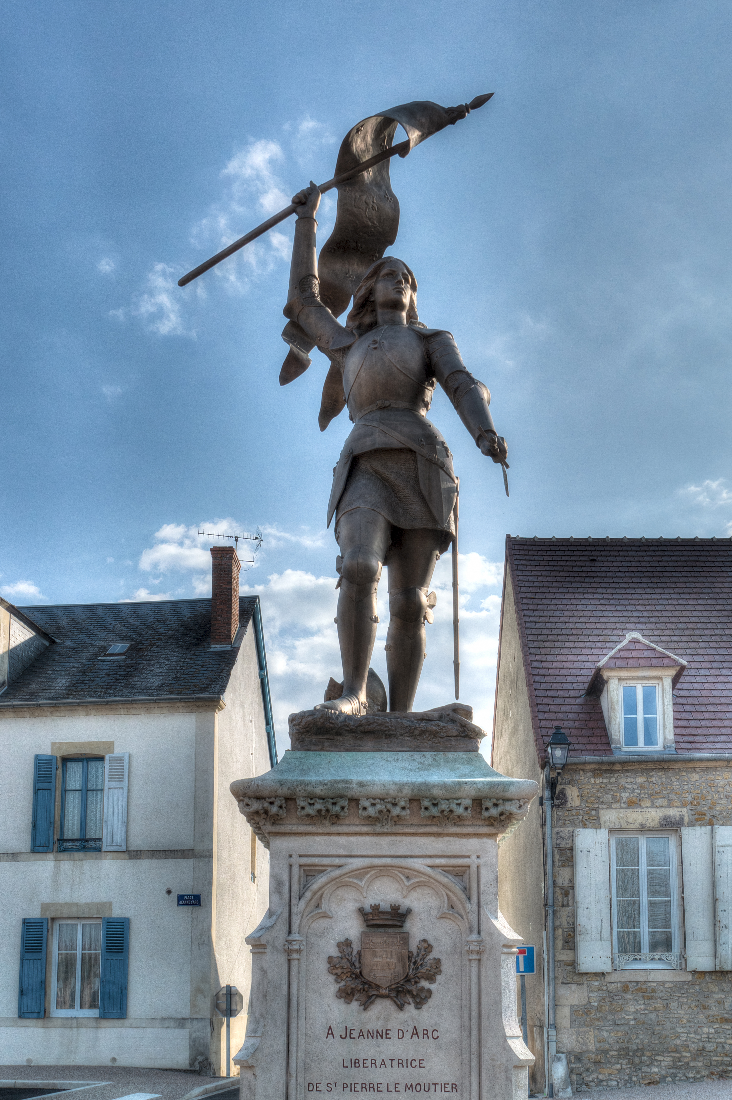 après restauration et déplacement en 2017